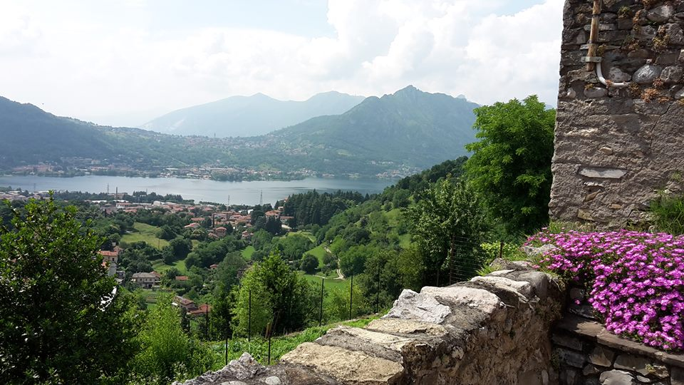 Вид на озеро Комо, провинция Лекко, Преальпы